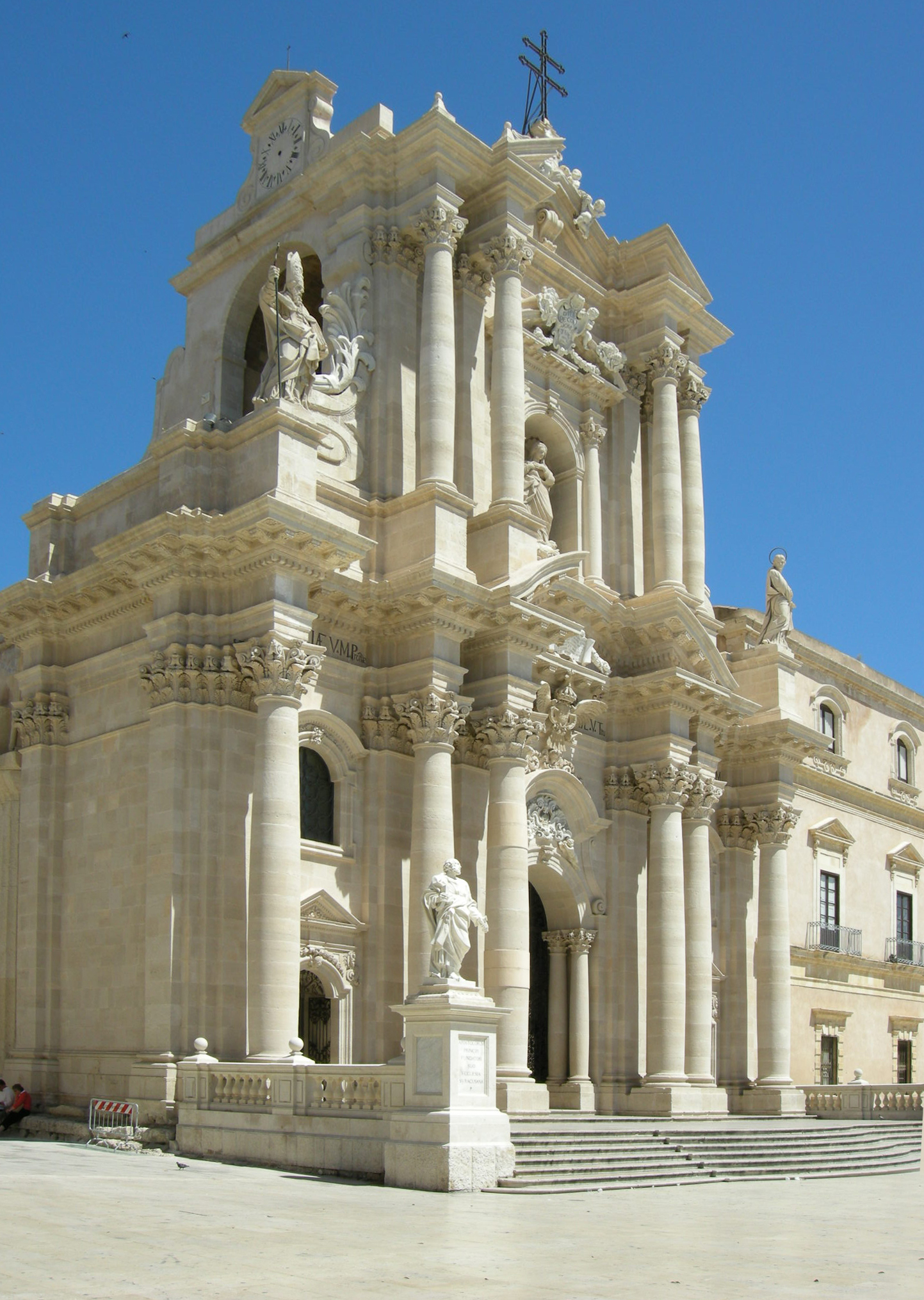 Ortigia, duomo, facciata